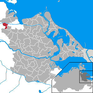 Levenhagen, Landkreis Ostvorpommern, Mecklenburg-Vorpommern